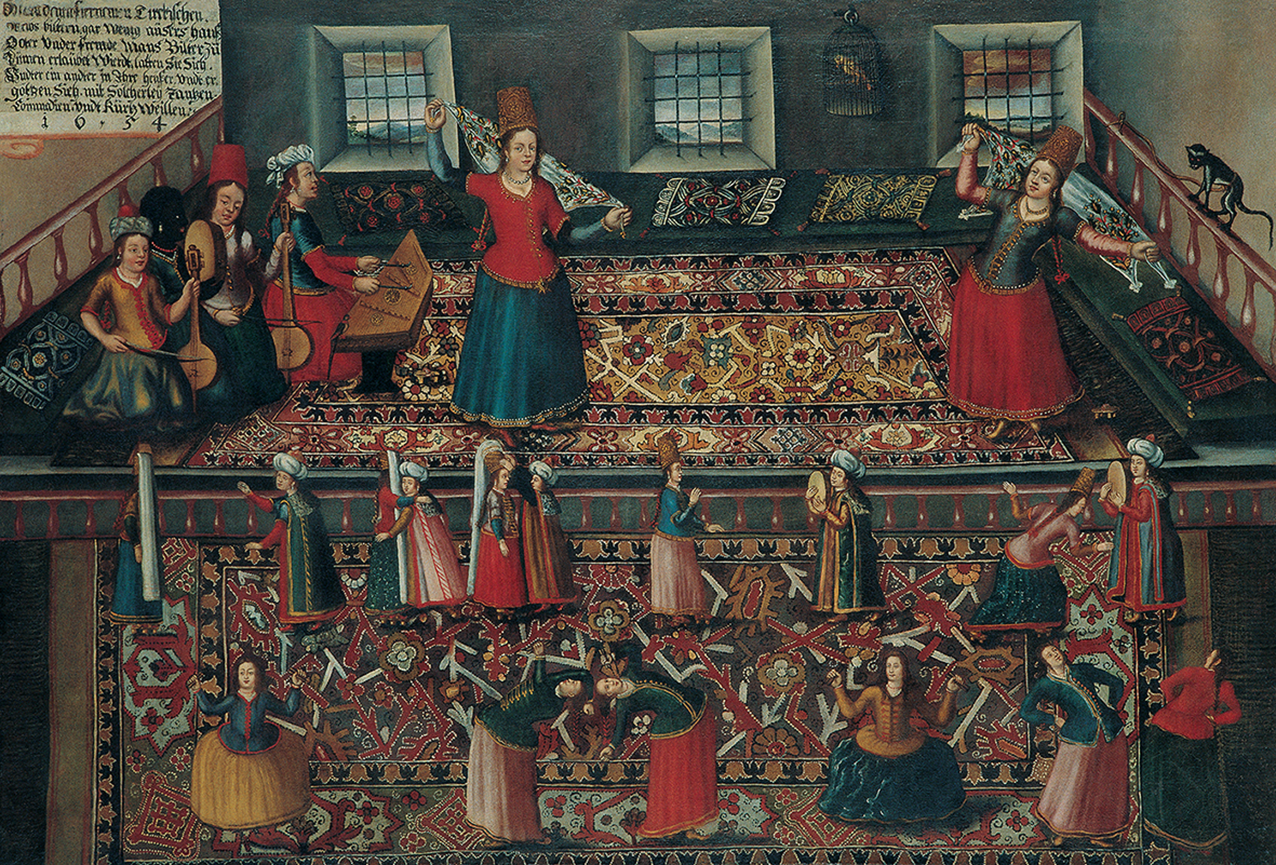 Osmanlı Haremi’nin betimlendiği ve üzerinde tarih bulunması açısından belgeleyici değeri olan bu eserde yer alan açıklamada da “seçkin Türk hanımlarının evlerinden çıkmaları ya da yabancılarla tanışmaları âdet olmadığından, onlar birbirlerini evlerine davet eder, dans, komedya ve benzeri eğlencelerle oyalanırlar” yazılıdır. İki bölüm halinde düzenlenmiş kompozisyonun alt bölümünde misafir karşılama ve dans teması işlenmiş, üst bölümdeyse rebab, def ve santur çalan sazendeler eşliğinde, başlarında terpuşları, ellerinde işlemeli yemenileriyle dans eden kadınlar betimlenmiştir.